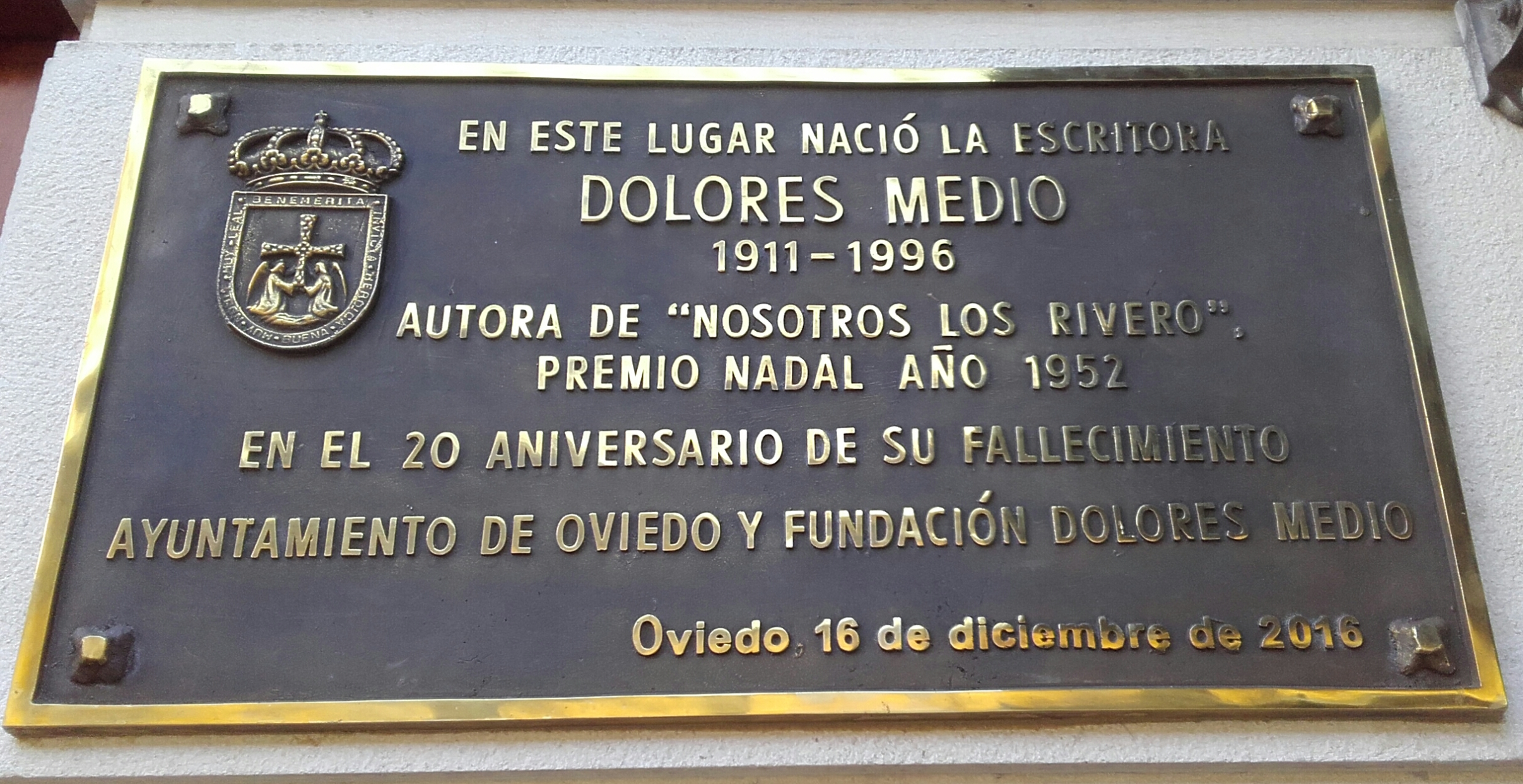 El 16 d'avientu de 2016, cuando se cumplíen 20 años de la so muerte, el Conceyu d'Uviéu homenaxó a la escritora colocando esta placa na casa onde nació.